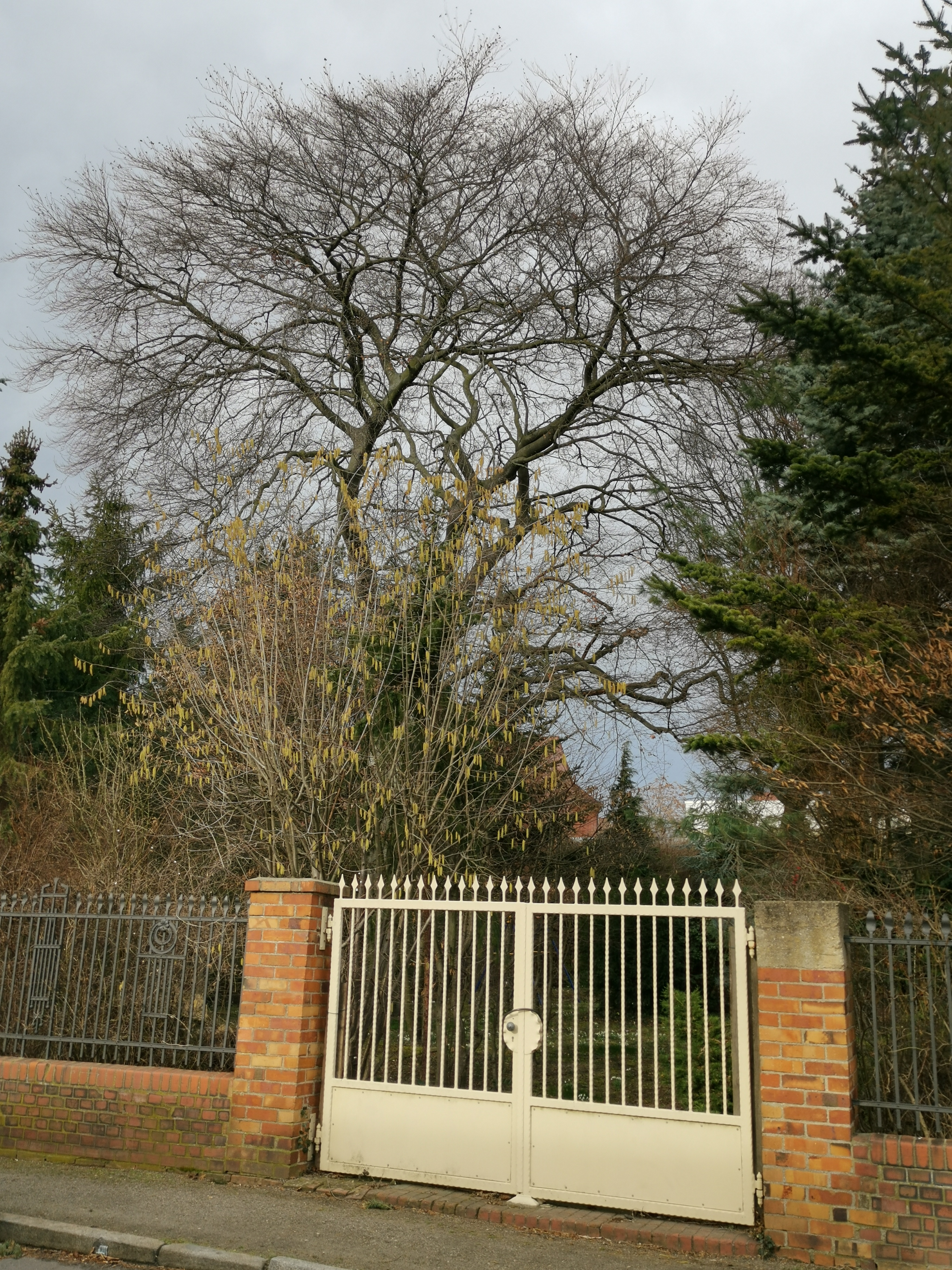 Als Naturdenkmal geschützte Blutbuche in der Joachim-Gottschalk-Straße 6 in Senftenberg